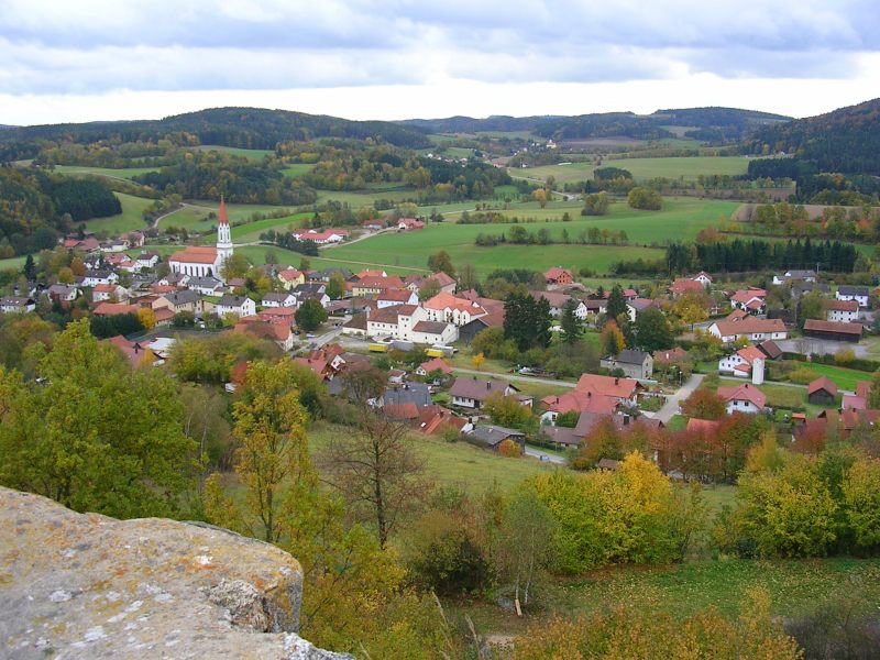 Zell (Oberpfalz) Germany Photographer: S. Fischer